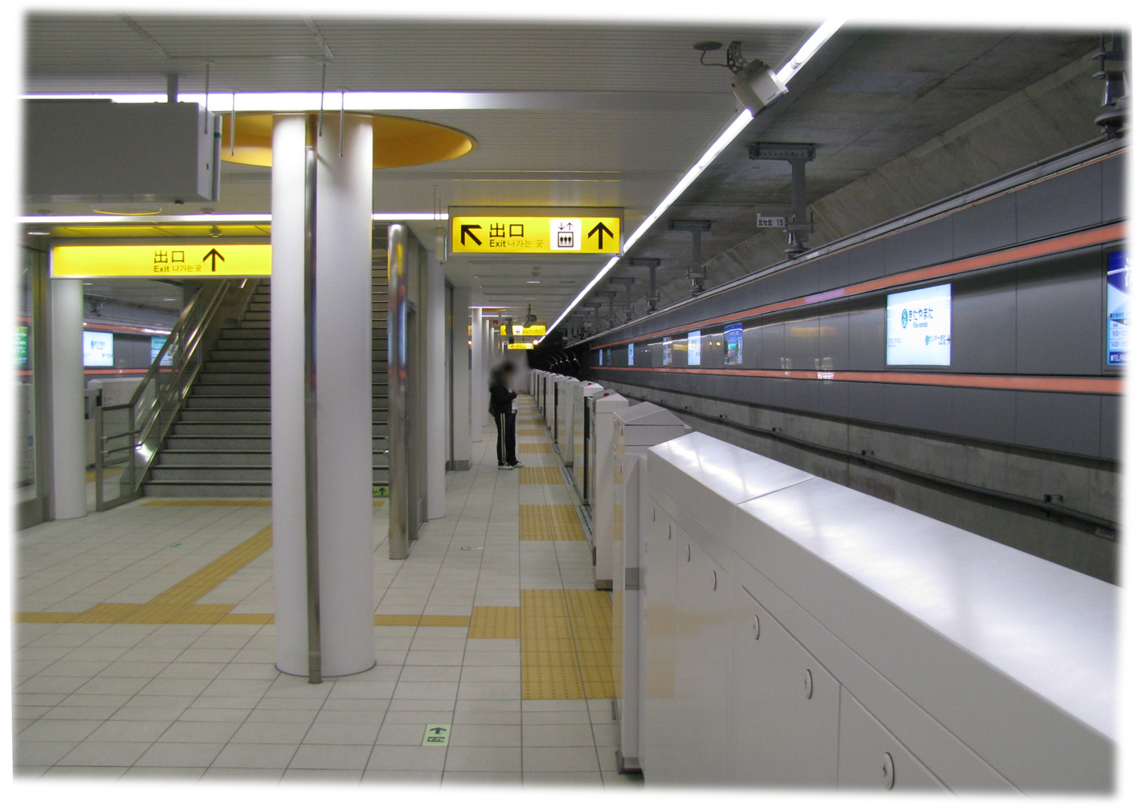 横浜市営地下鉄グリーンライン北山田駅